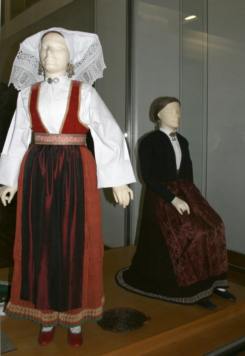 snimljeno tijekom Noći muzeja u Etnografskom muzeju u Zagrebu